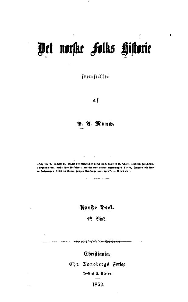 Tittelside til Det norske Folks historie av P A Munch.